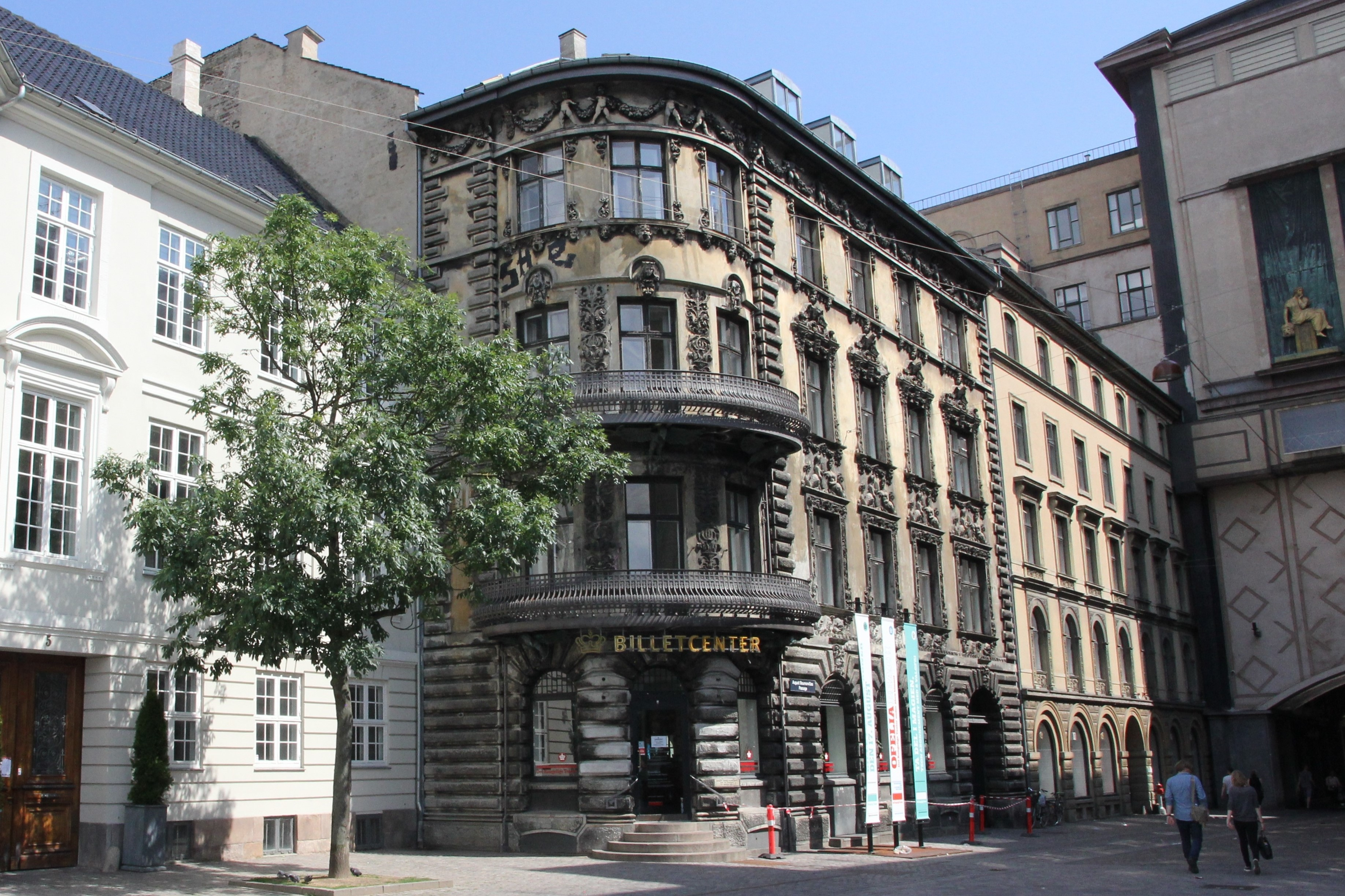 Brønnums Hus on Kongens Nytorv in Copenhagen, Denmark